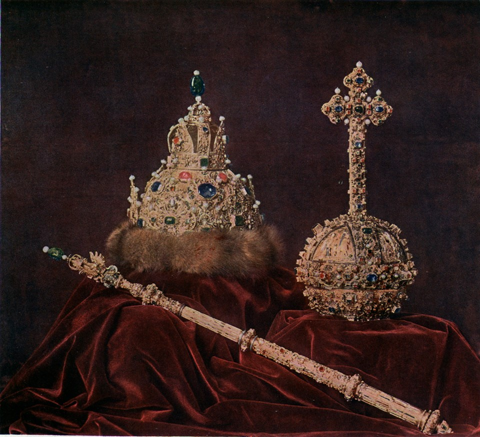 «Большой наряд» царя Михаила Федоровича из основного собрания Оружейной палаты на снимке пионера цветной фотографии, знаменитого Сергея Михайловича Прокудина-Горского, 10-ые годы XX века. Венец – Москва, мастерские Кремля, 1627 год; скипетр и держава – Западная Европа, около 1600 года.